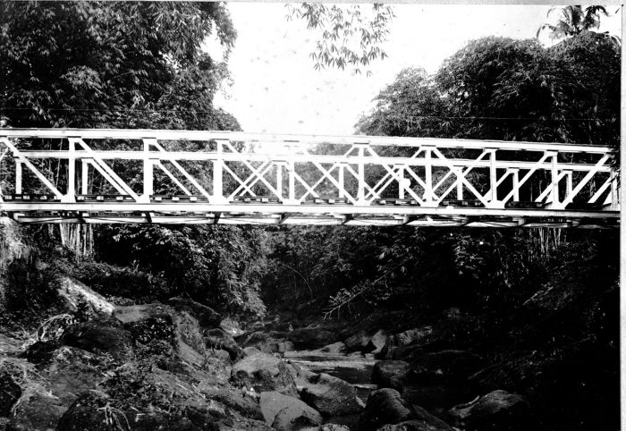 Foto. Spoorbrug van de Serajoedal-Stoomtram-Maatschappij over de Peloes-rivier in de dessa Soekaradja-Wetan, vlak bij de halte Soekaradja, Midden-Java